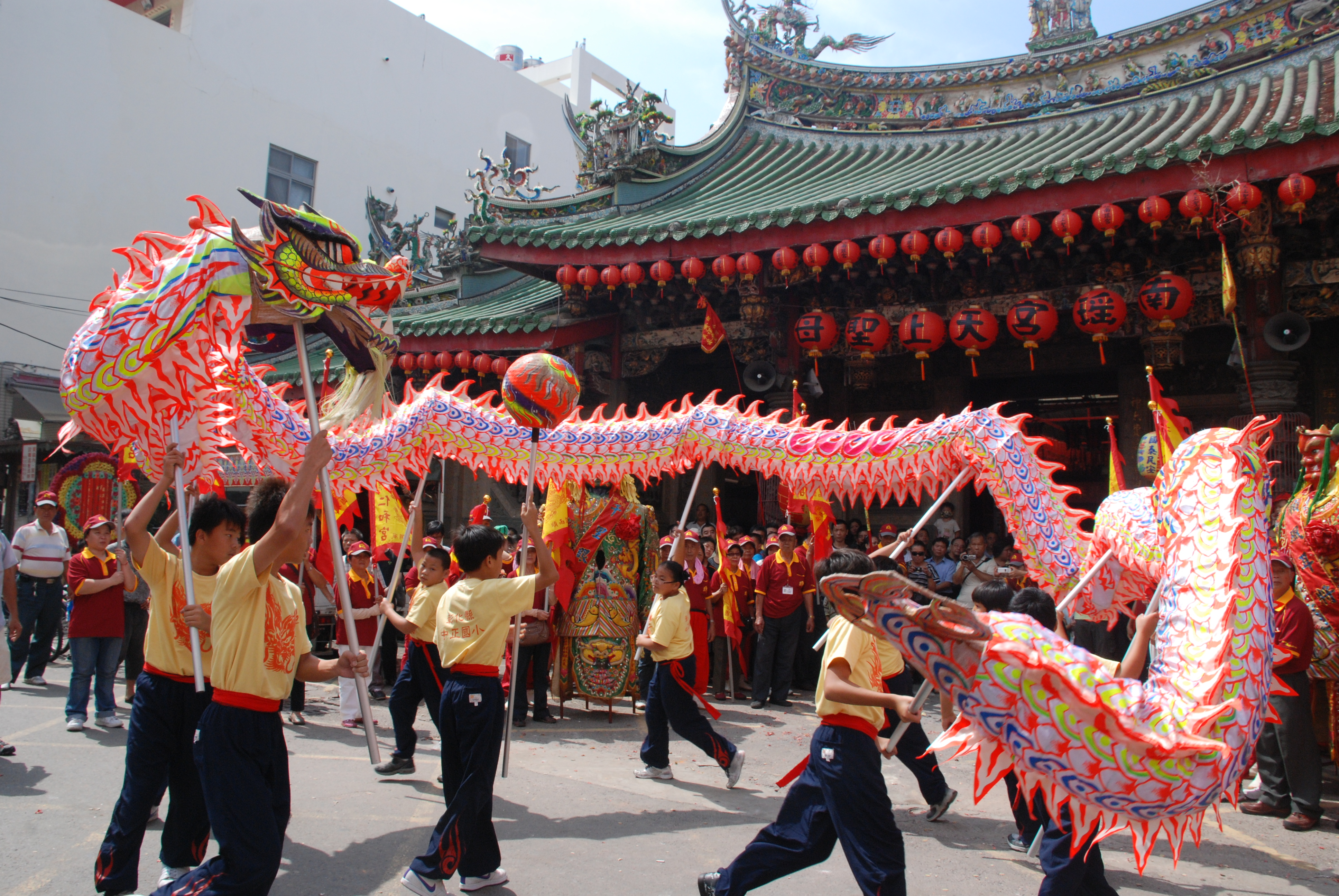 彰化縣彰化市南瑤宮前，彰化縣二林鎮中正國民小學舞龍隊。